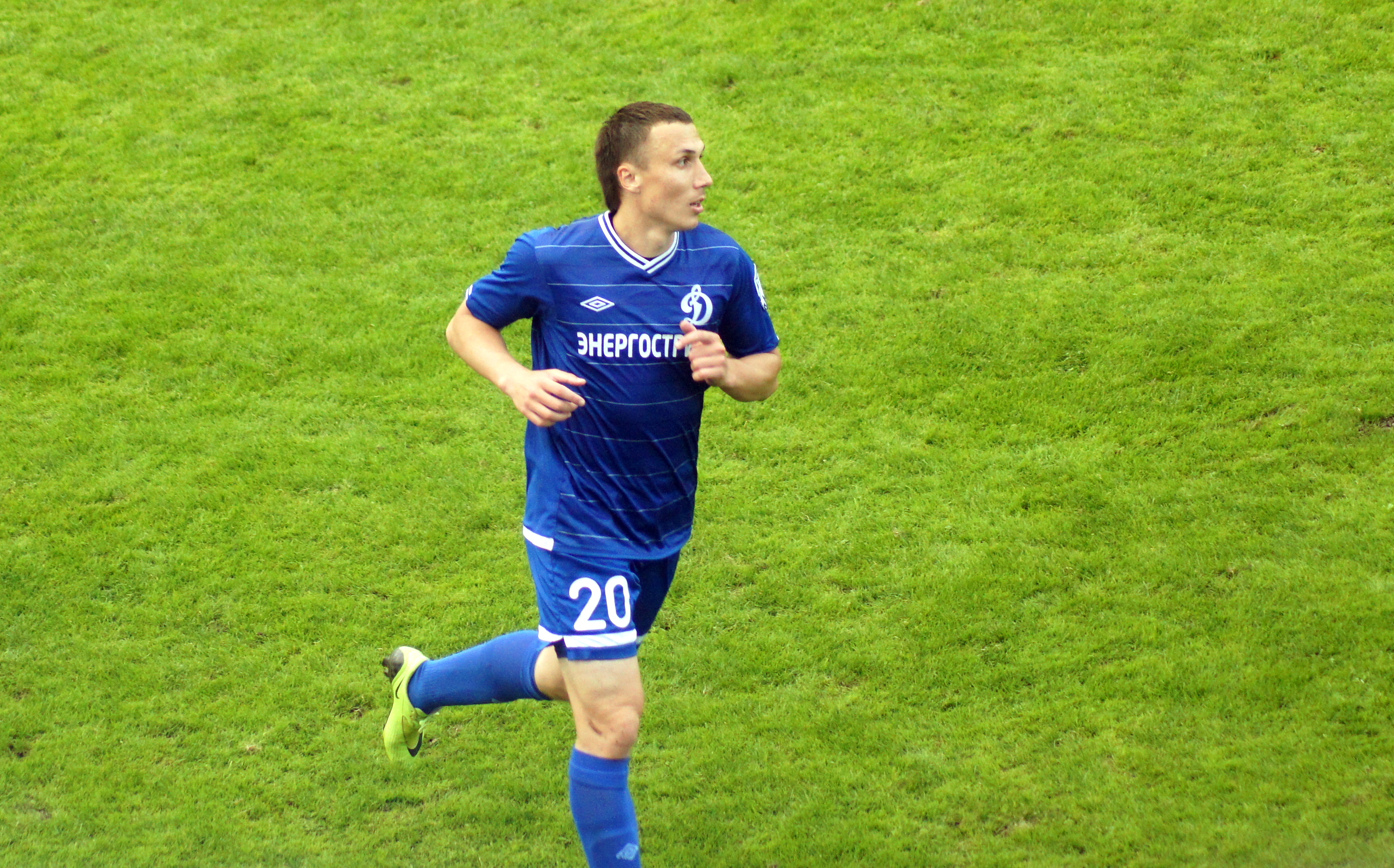 Шелютов Евгений Евгеньевич